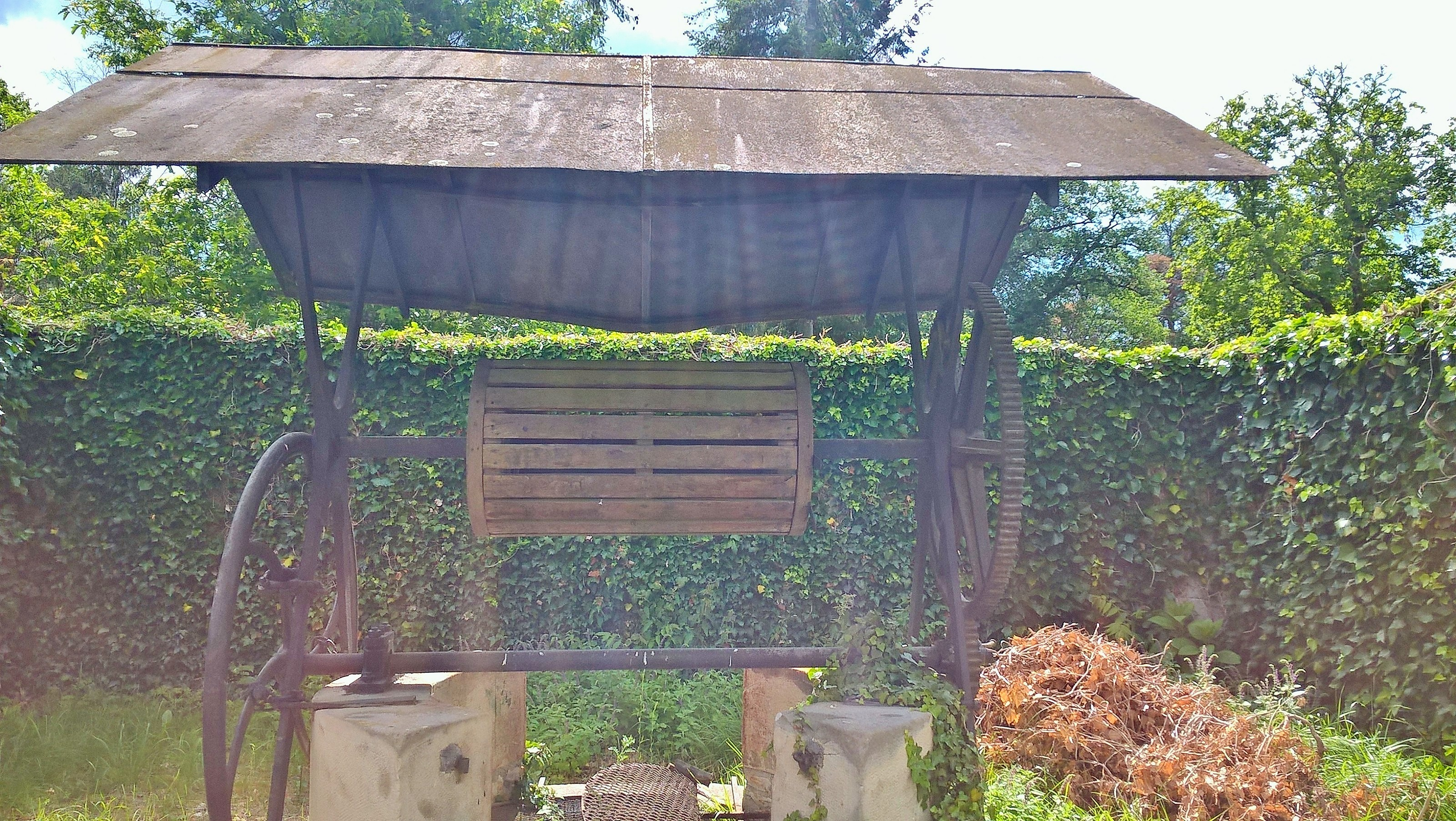 Puits Ermitage prieuré de Franchard forêt de Fontainebleau